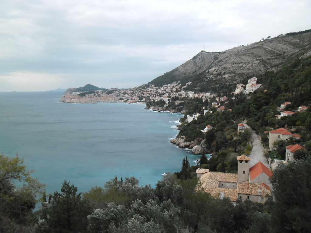 pogled na Grad Dubrovnik s područja poviše Belvederea